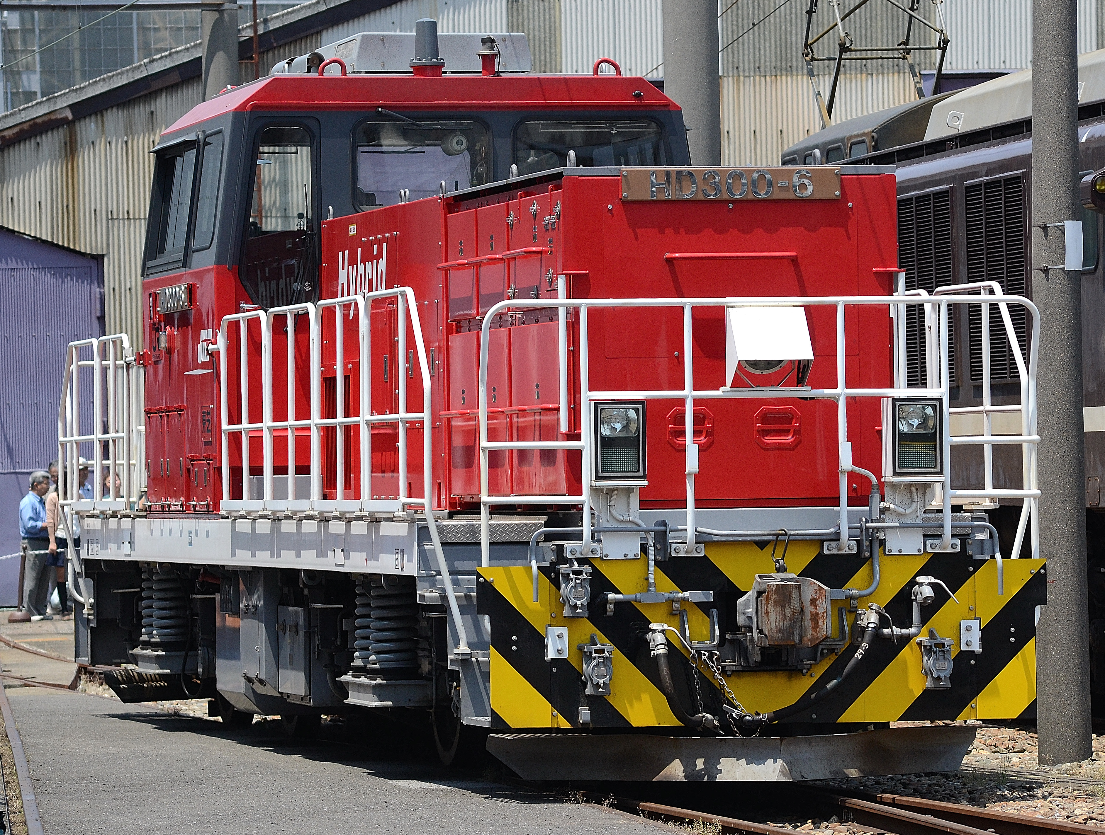 JR貨物HD300形ハイブリッド機関車6号機。（2014年のJRおおみやふれあい鉄道フェアーでの工場開放にて撮影）